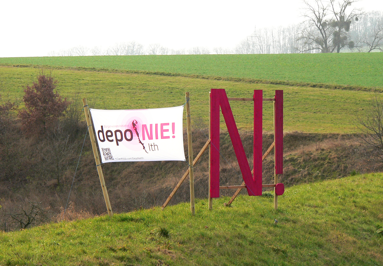 Rosa N in Harderode gegen eine Deponie in einem Steinbruch im Ith